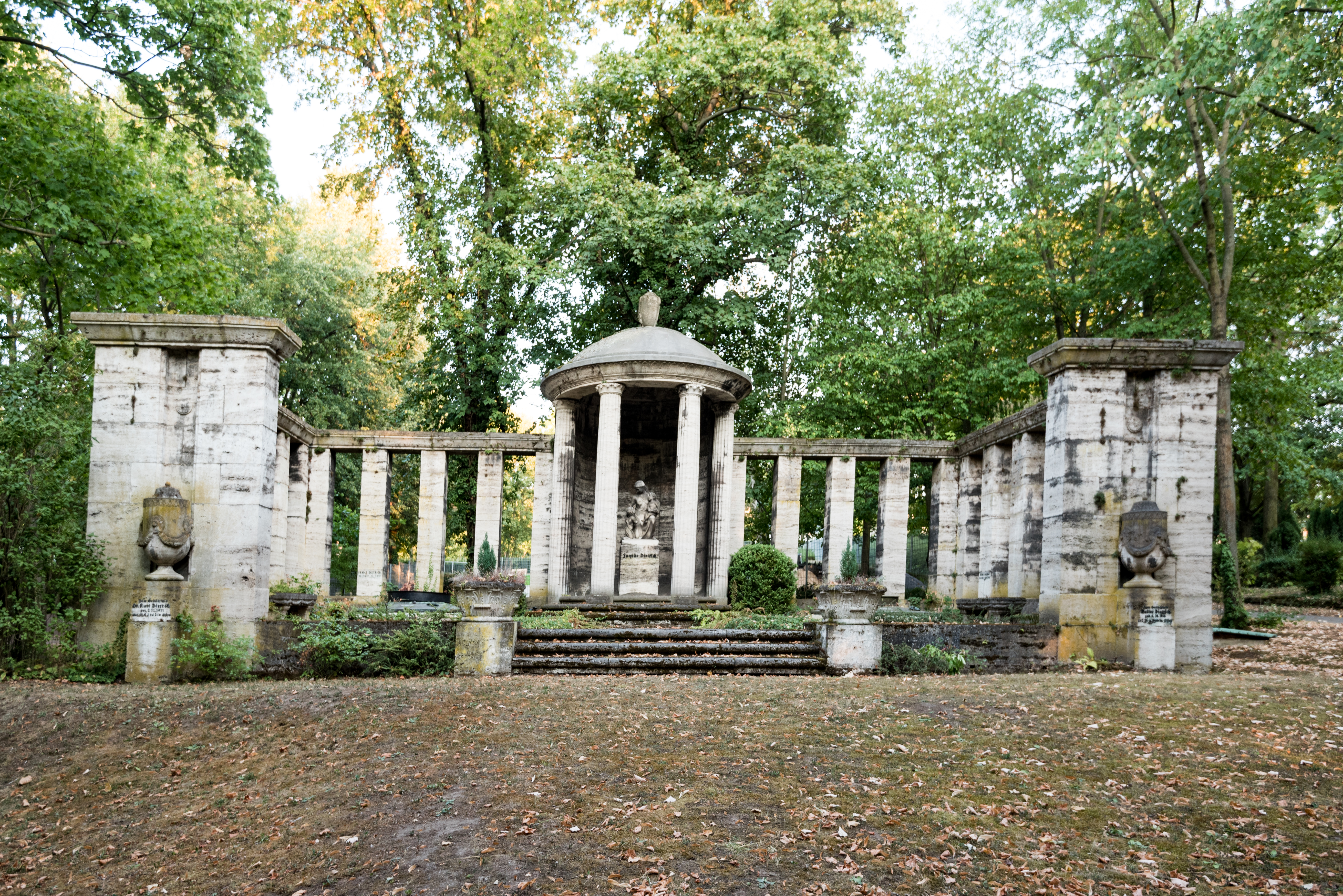 Weißenfels, Am Sausenhölzchen, Friedhof, Grabmal Familie Dietrich